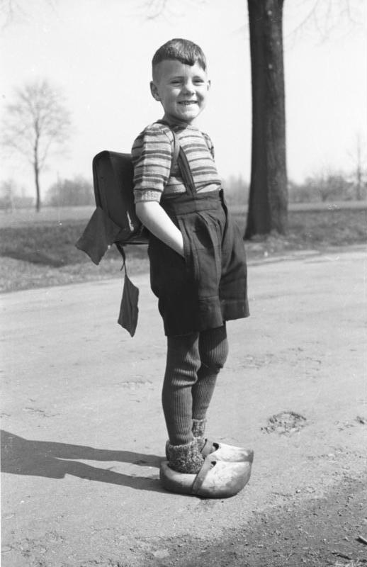 Holzschuhe. Schultag in Holtwick